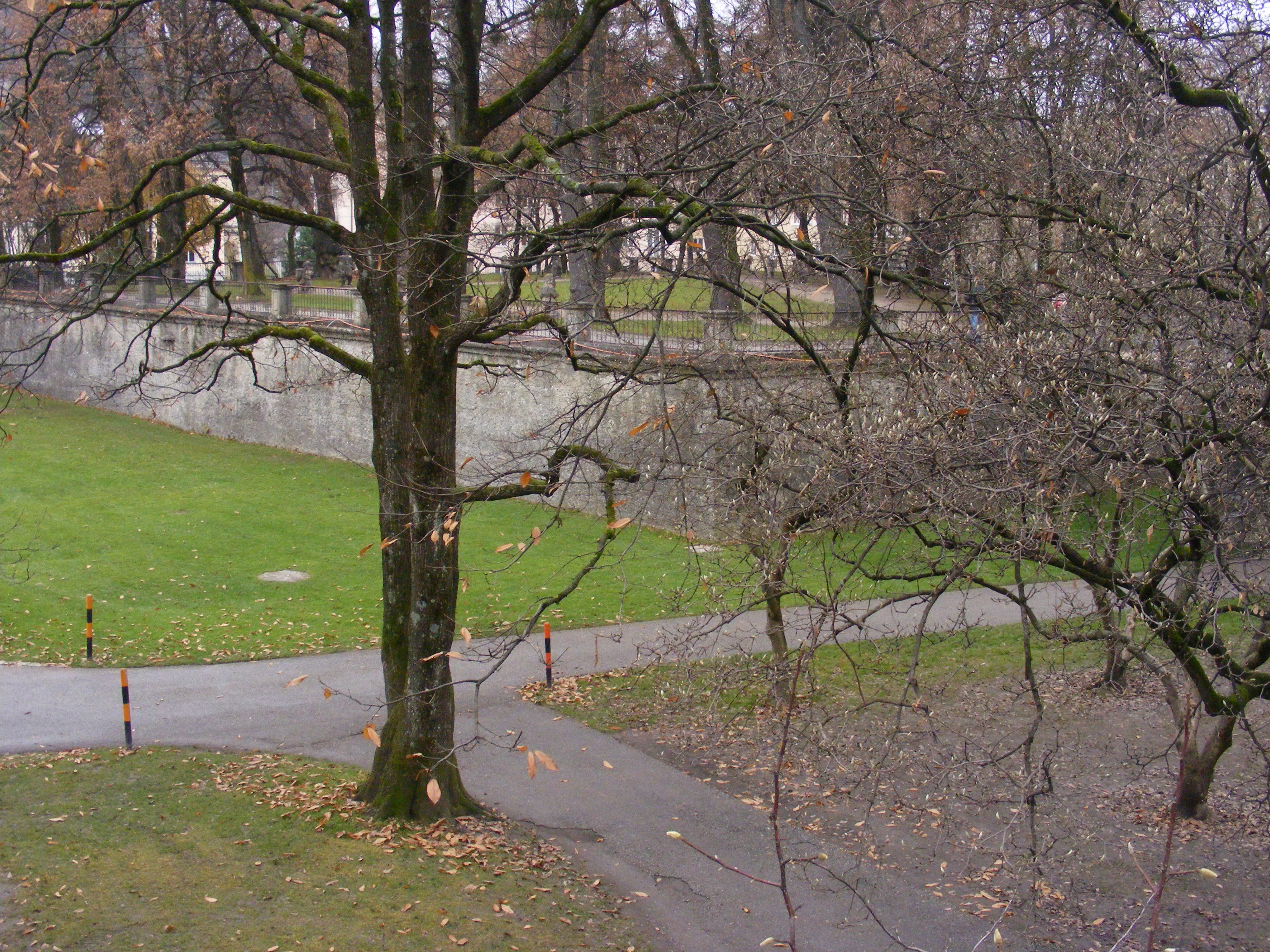 Salzburg: im Bastionsgarten, Teil der zum Kurpark hin gelegenen Parkanlage von Schloss Mirabell